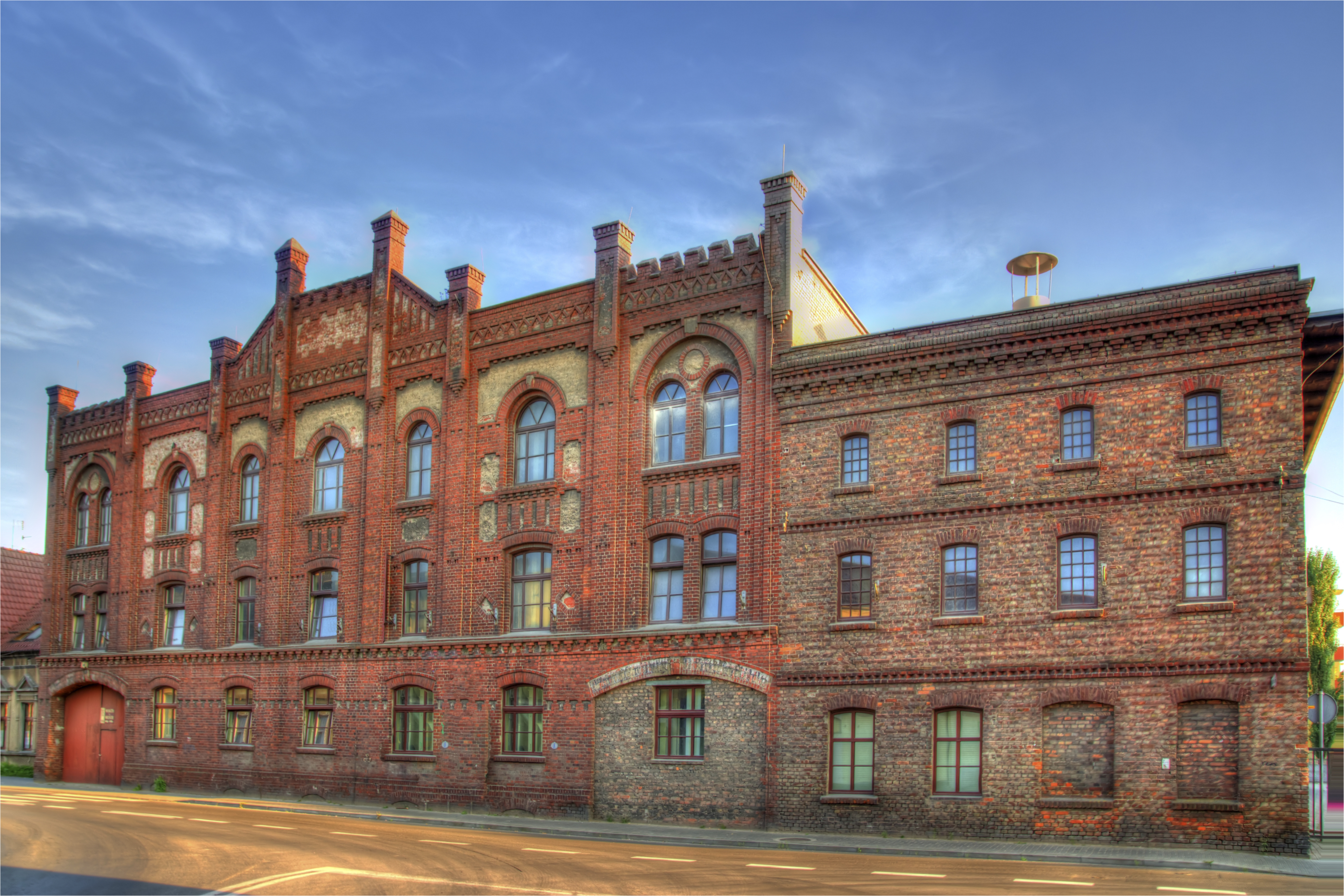 zespół młyna przemysłowego: spichrz, ob. młyn z 1885 r., spichrz, ob. czyszczarnia z 1885 r., budynek administracyjno-mieszkalny z k. XIX w., kotłownia, ob. garaż, k. XIX w. Nowy Tomyśl, ul. Zbąszyńska 1, Nowy Tomyśl